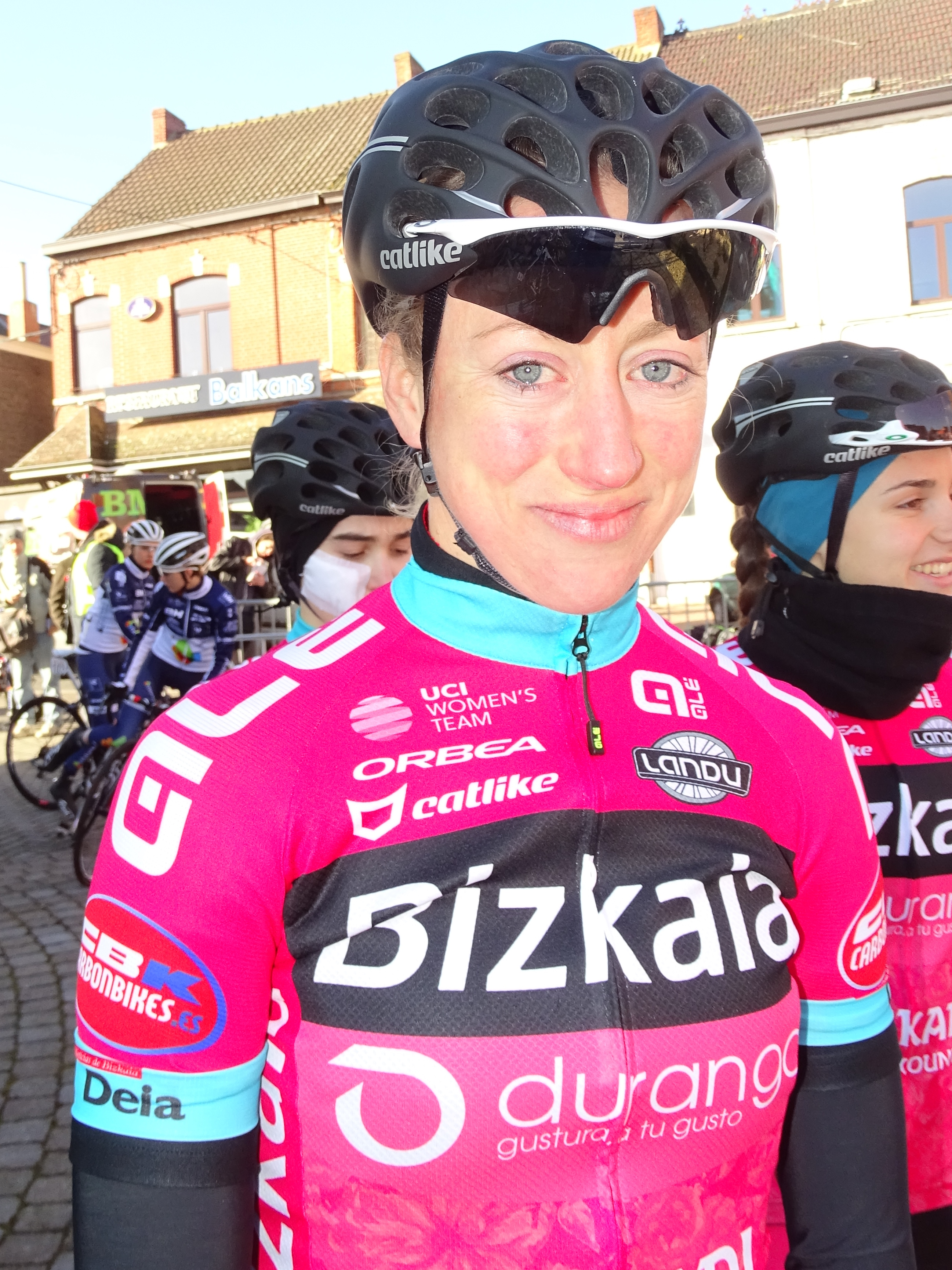 Reportage réalisé le mercredi 2 mars à l'occasion du départ du Samyn des Dames 2016 et du Samyn 2016 à Quaregnon, Belgique.